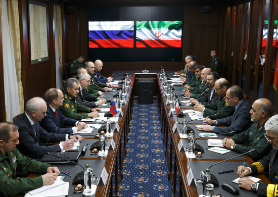 Встреча Министра обороны Российской Федерации генерала армии Сергея Шойгу с Министром обороны Ирана бригадным генералом Хосейном Дехканом